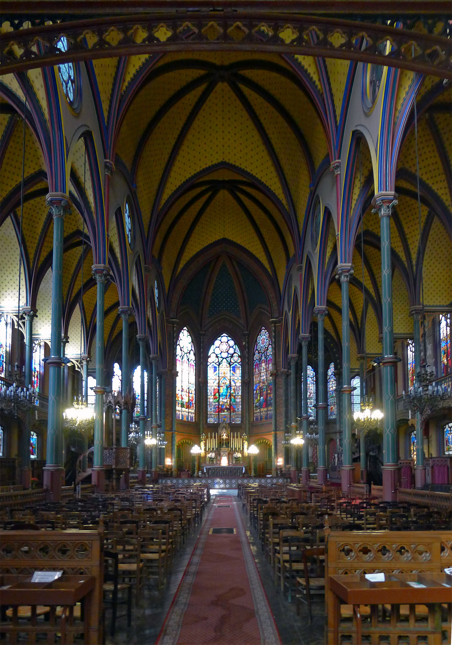 Église Saint-Eugène Sainte-Cécile (nef) - Paris IX